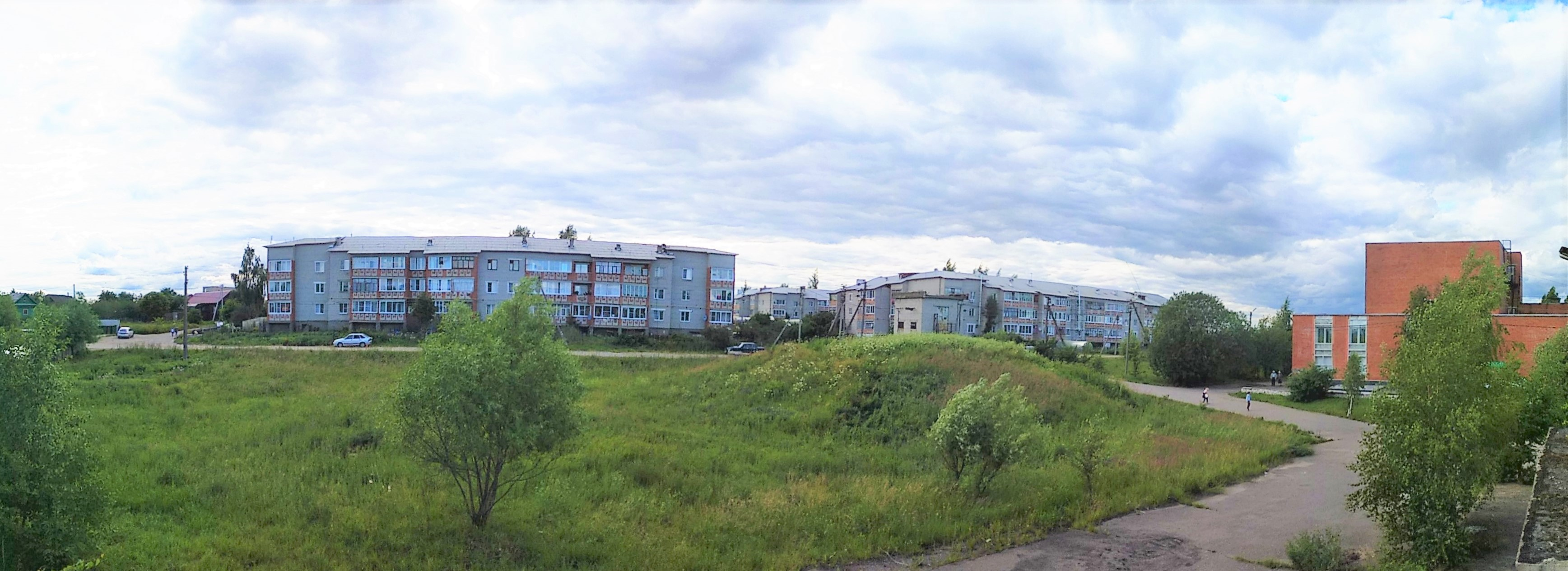 Вид на квартал В и Шурскольский Дом культуры (красное здание справа)